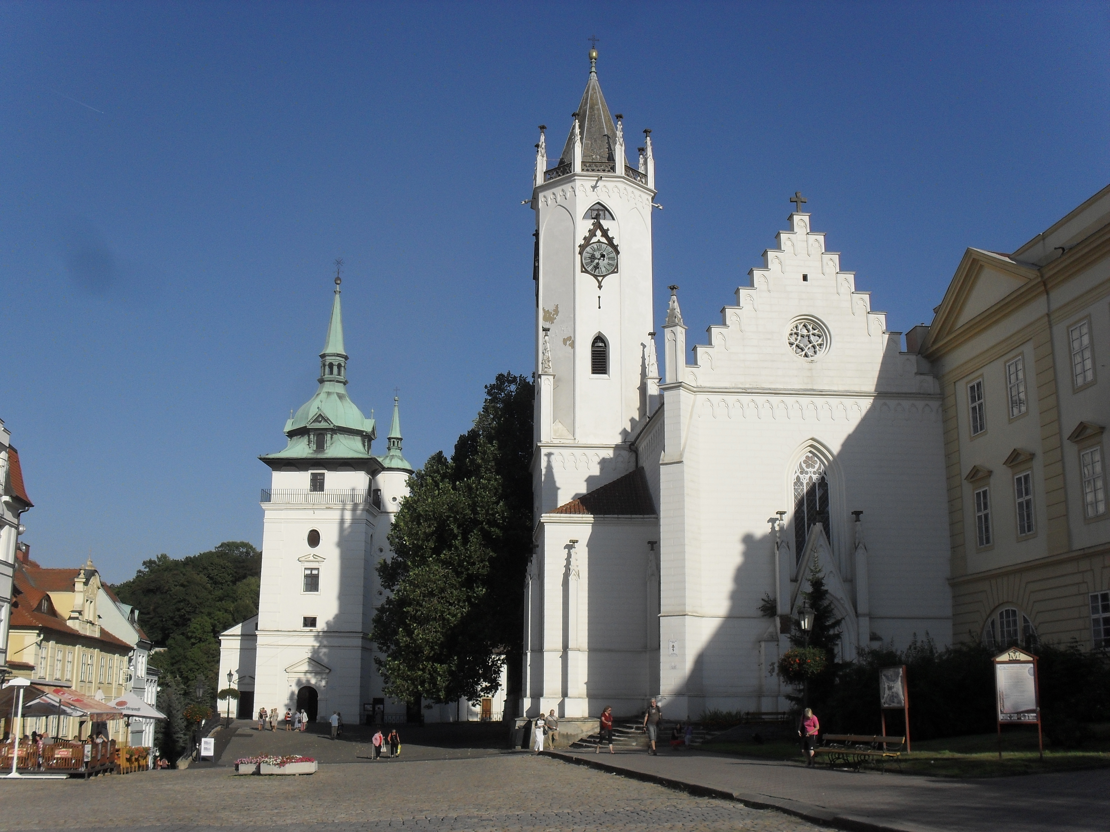 TTO: Kostel sv. Jana Křtitele (Teplice)- Teplice, Zámecké náměstí 135.